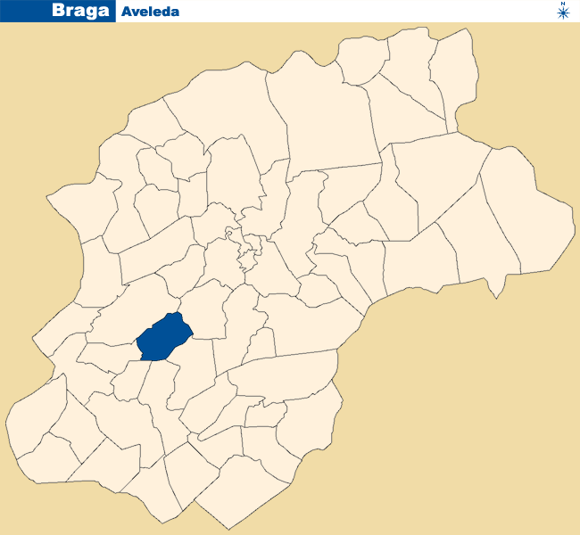 Localização de Aveleda no concelho de Braga.